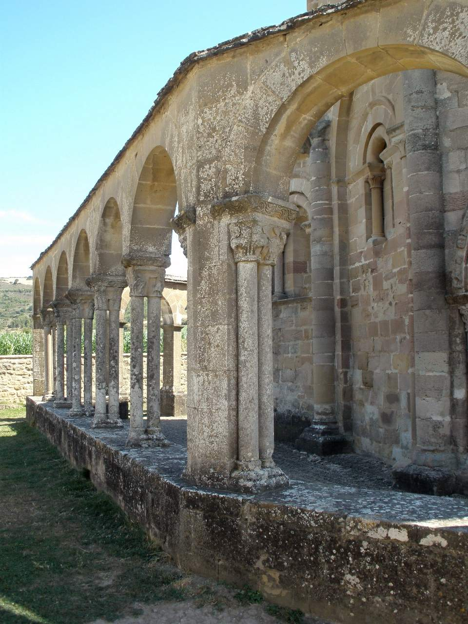 Ermita de Santa María de Eunate (Muruzábal, Navarra)